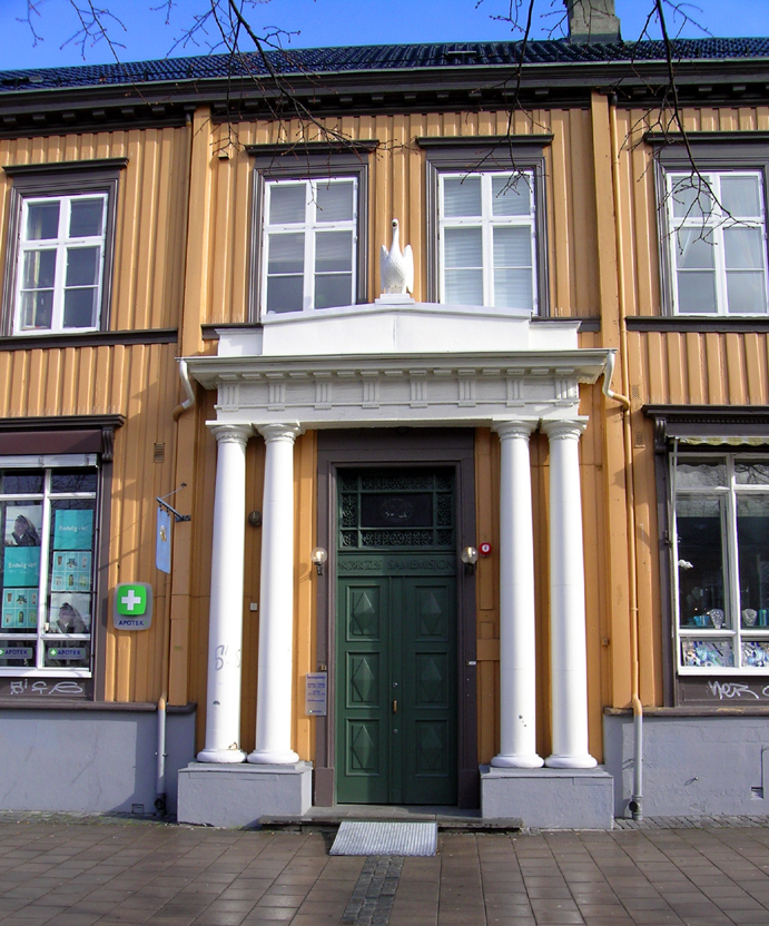 Portal, Svaneapoteket, Trondheim.